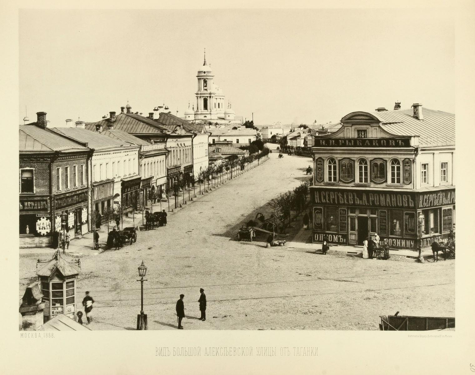 Москва. Бол.Алексеевская ул. (до 1919г., будущая ул.А.Солженицына), 1888г. Вид с Таганской пл., слева виден Храм Святителя Мартина Исповедника.